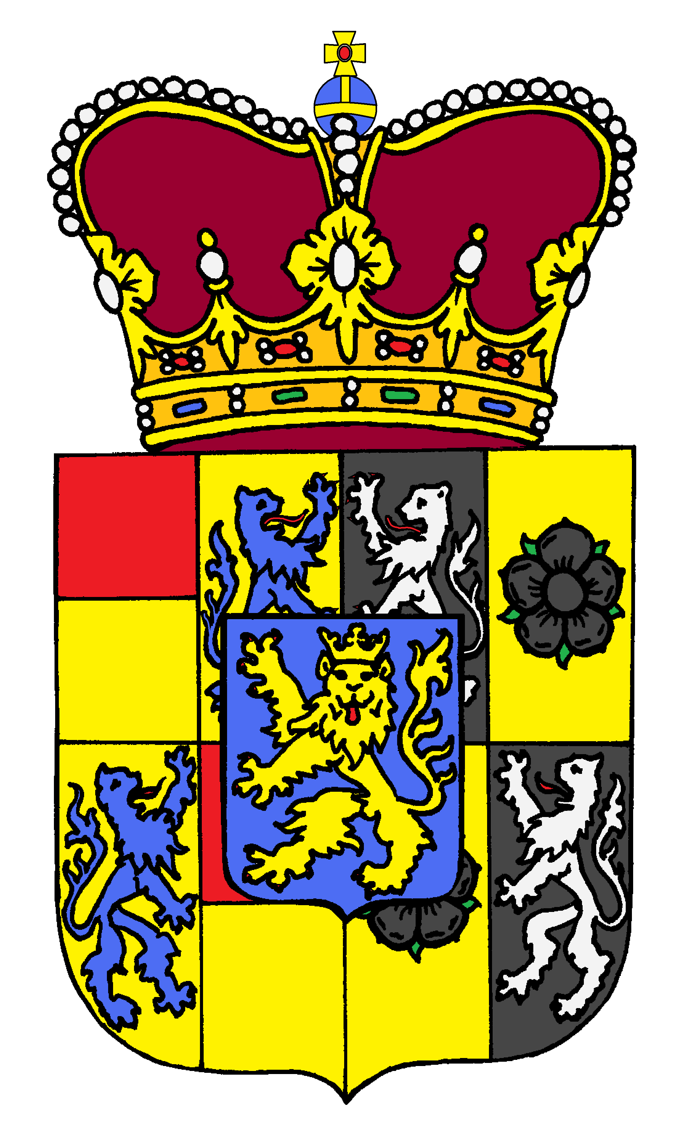 Wappen des Fürst von Schwarzburg-Graf von Solms-Wildenfels (Prince of Schwarzburg, Count of Solms-Wildenfels)